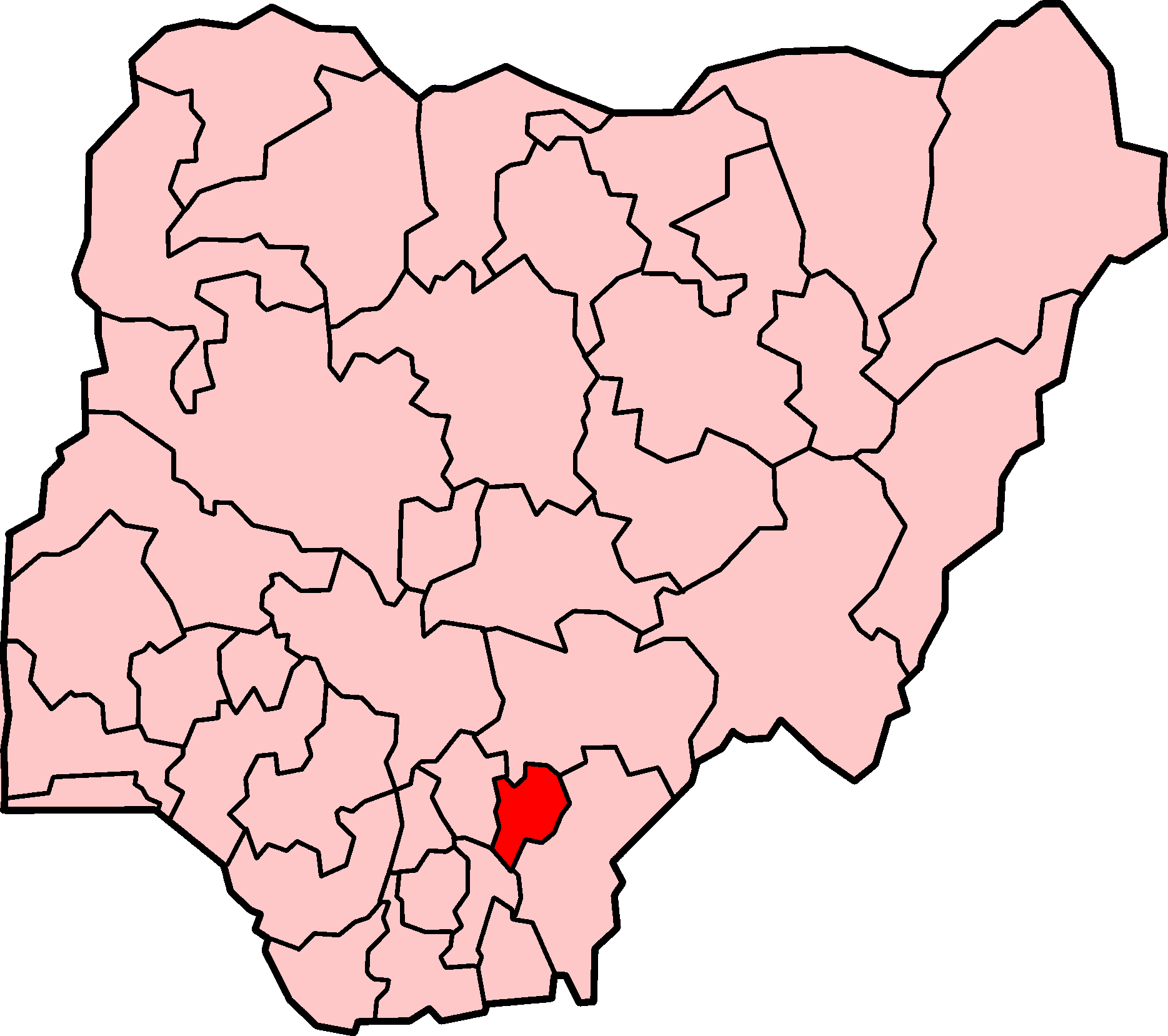 Localização do estado de Ebonyi na Nigéria.